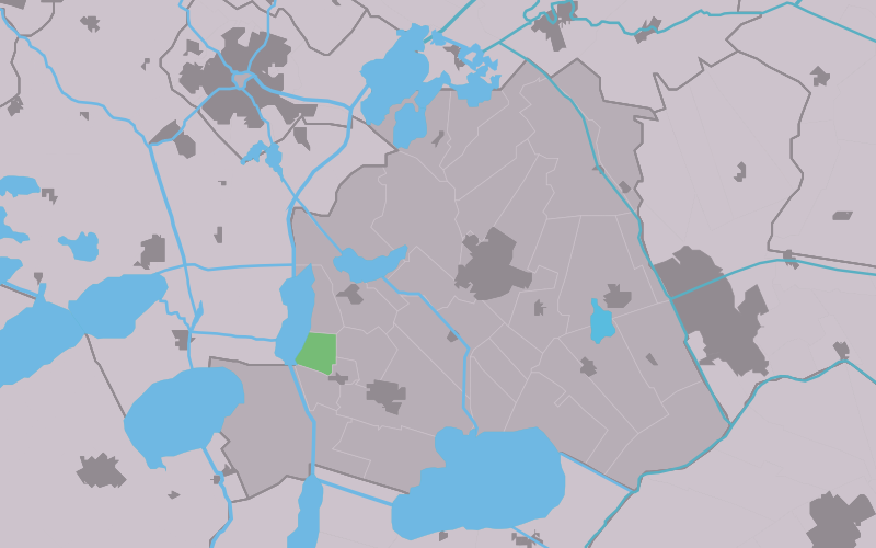 Kaartsje fan himrik fan Teroele